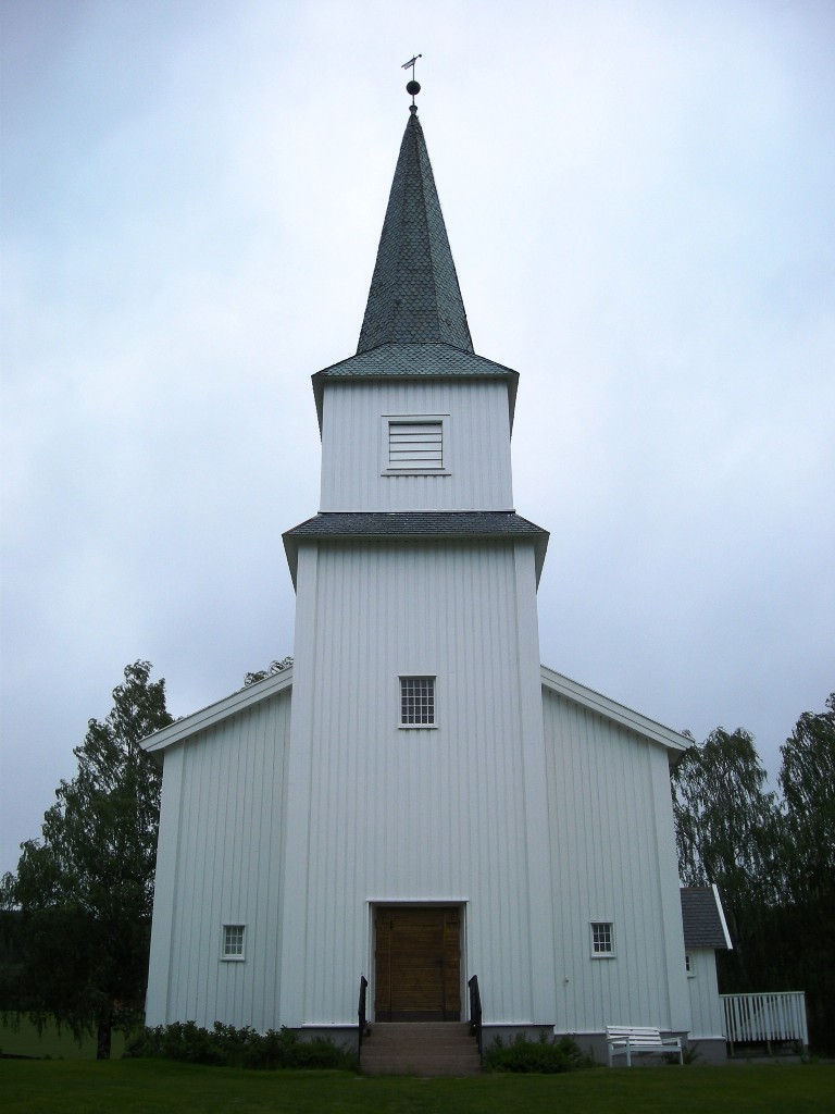 Enger kirke i Søndre Land